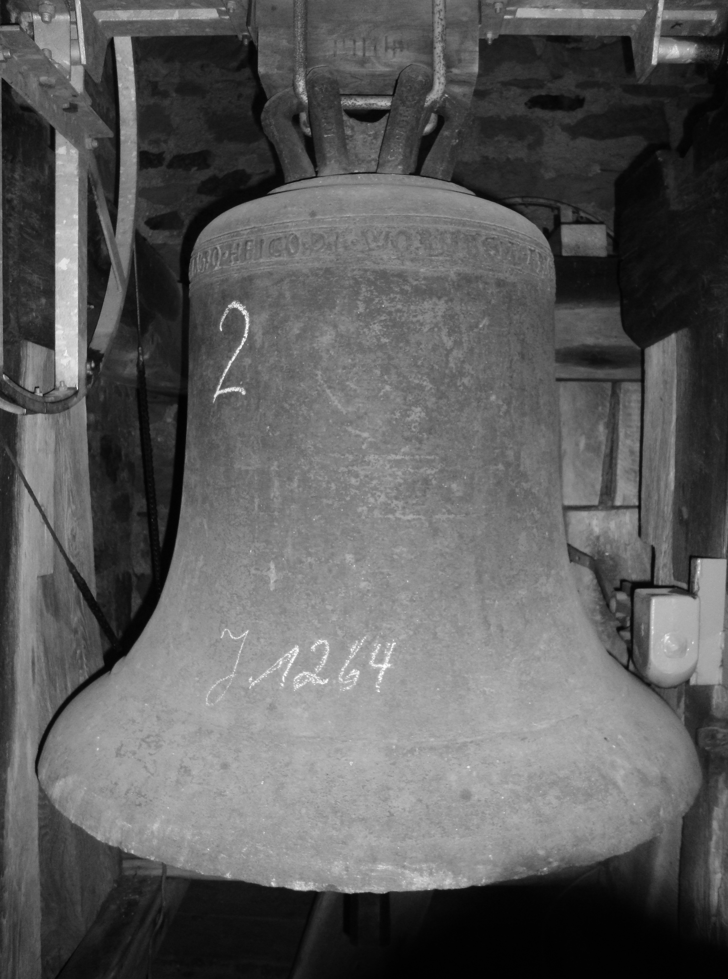 Auhausen, Klosterkirche Ss. Maria und Godehard: Zwölfuhrglocke (1264)